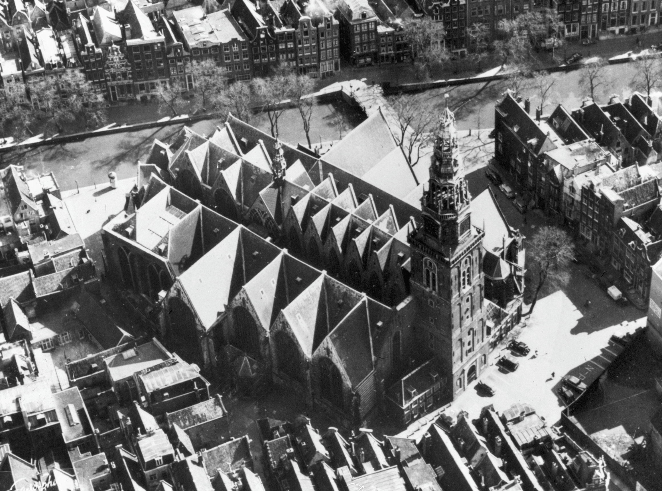 Hervormde Oude Kerk: Overzicht vanuit de lucht